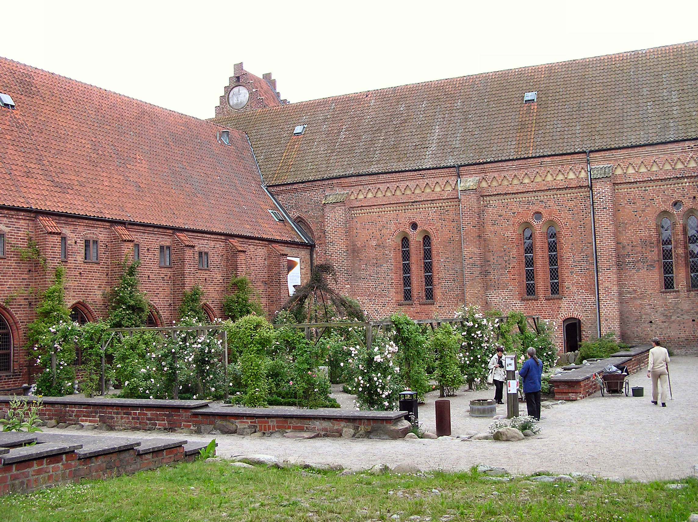 Gråbrødreklostret med Sankt Petri kirke,Ystad